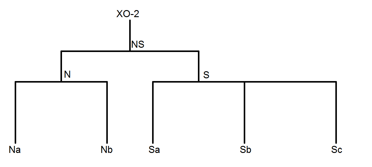 Le système XO-2 : - le sous-système XO-2 N : l'étoile (Na) et sa planète (Nb) - le sous-système XO-2 S : l'étoile (Sa) et ses deux planètes (Sb et Sc).